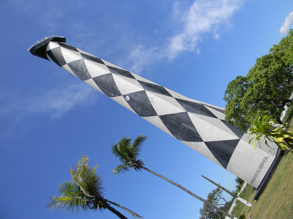 Farol Araçagi, na estrada São Luis/Raposa, Paço do Lumiar, Maranhão, Brasil.